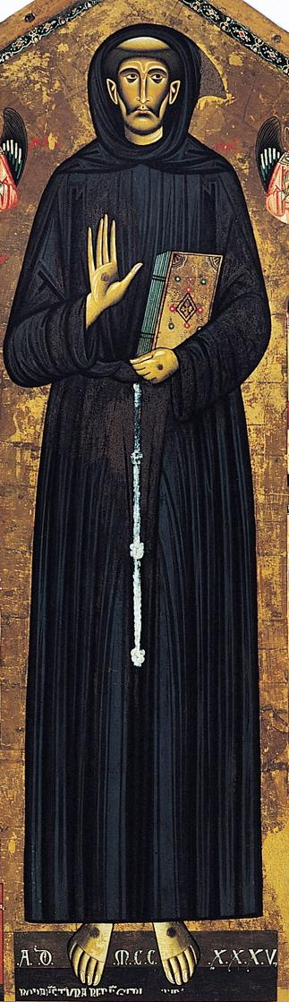 detail